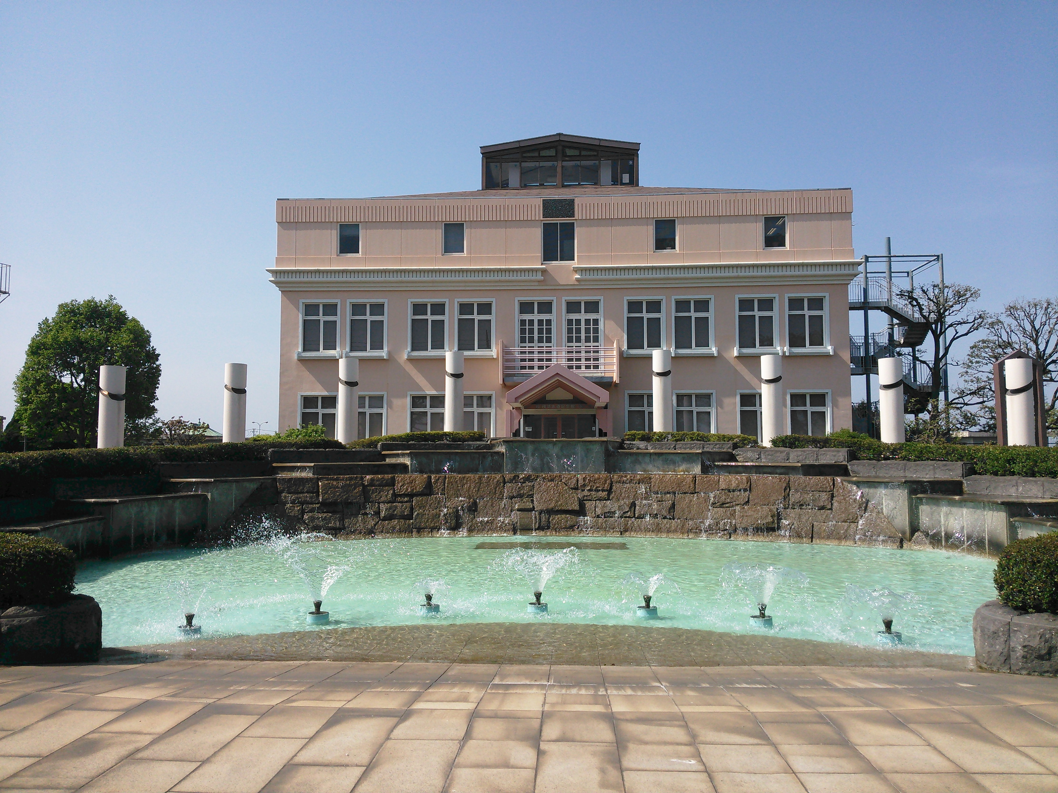 横浜市保土ケ谷区、横浜水道記念館